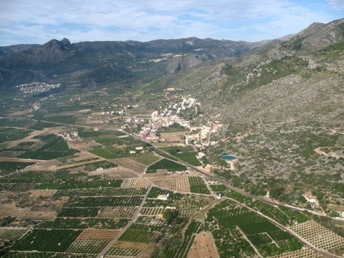 Vista parcial del termino municipal de Tormos